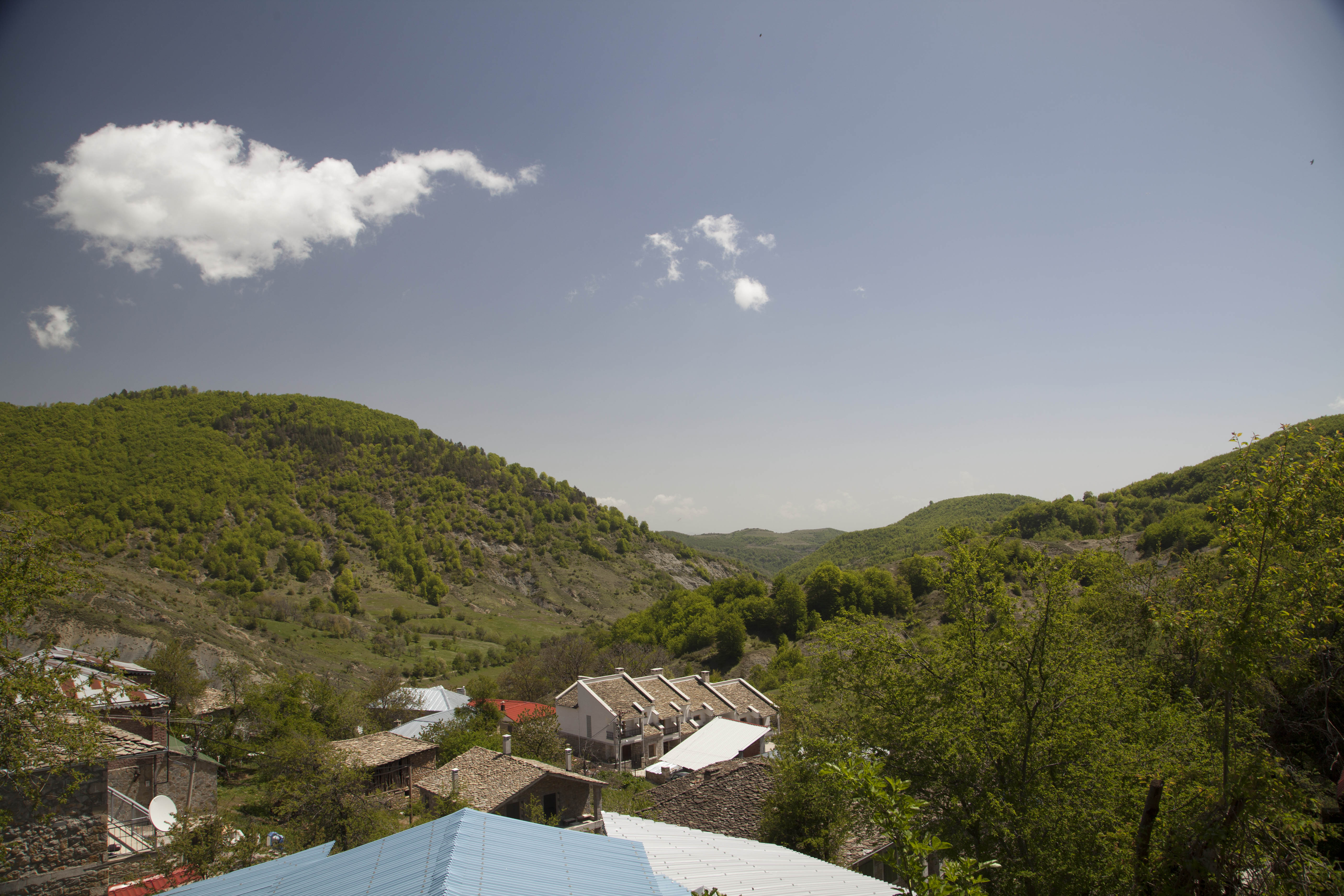 Dardhe, Albania